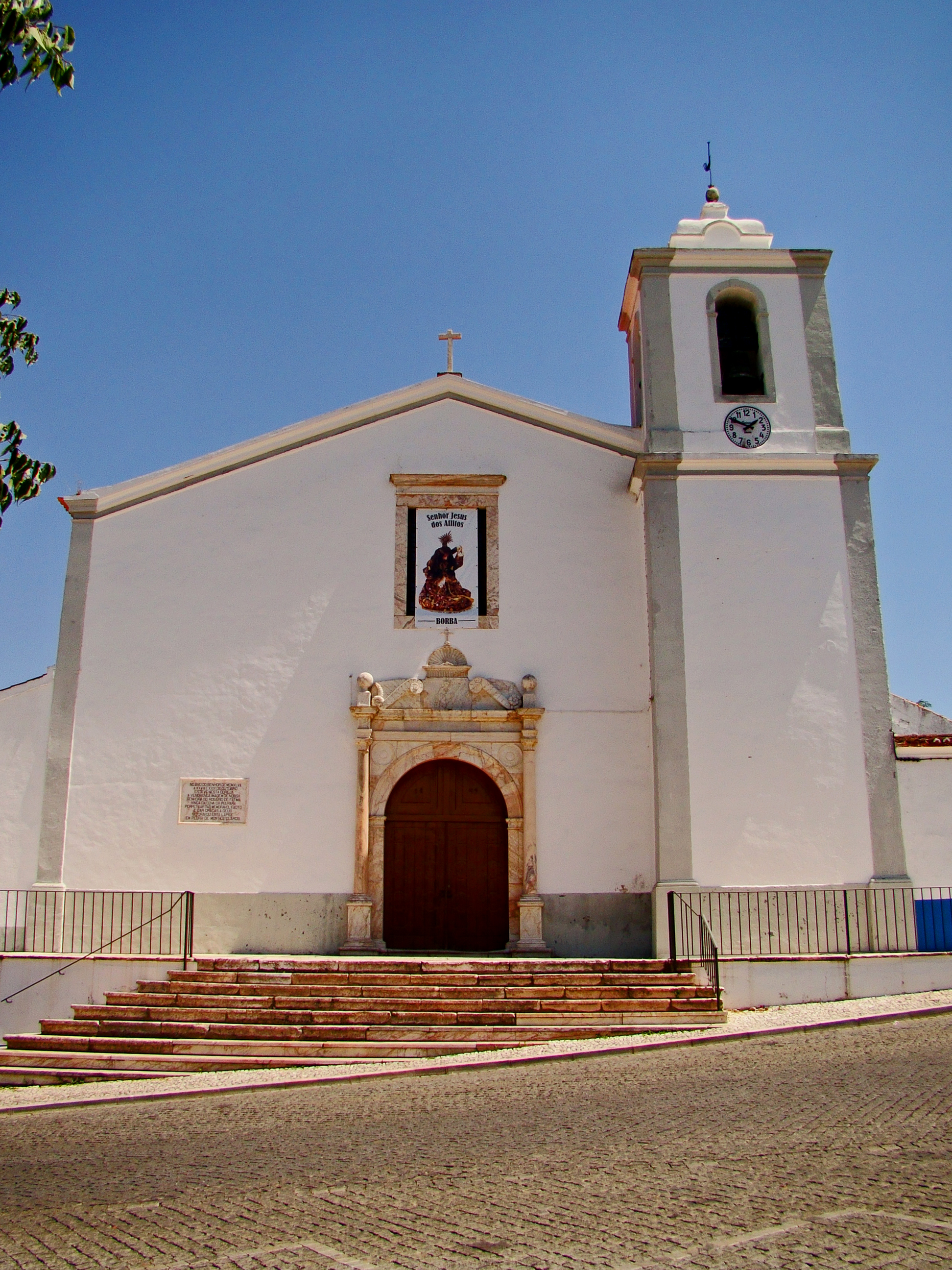 Igreja matriz Borba / Igreja Paroquial de Borba / Igreja de Nossa Senhora do Soveral / Igreja de Nossa Senhora das Neves This file was uploaded for Wiki Loves Monuments in Portugal with the unique identifier 340777.